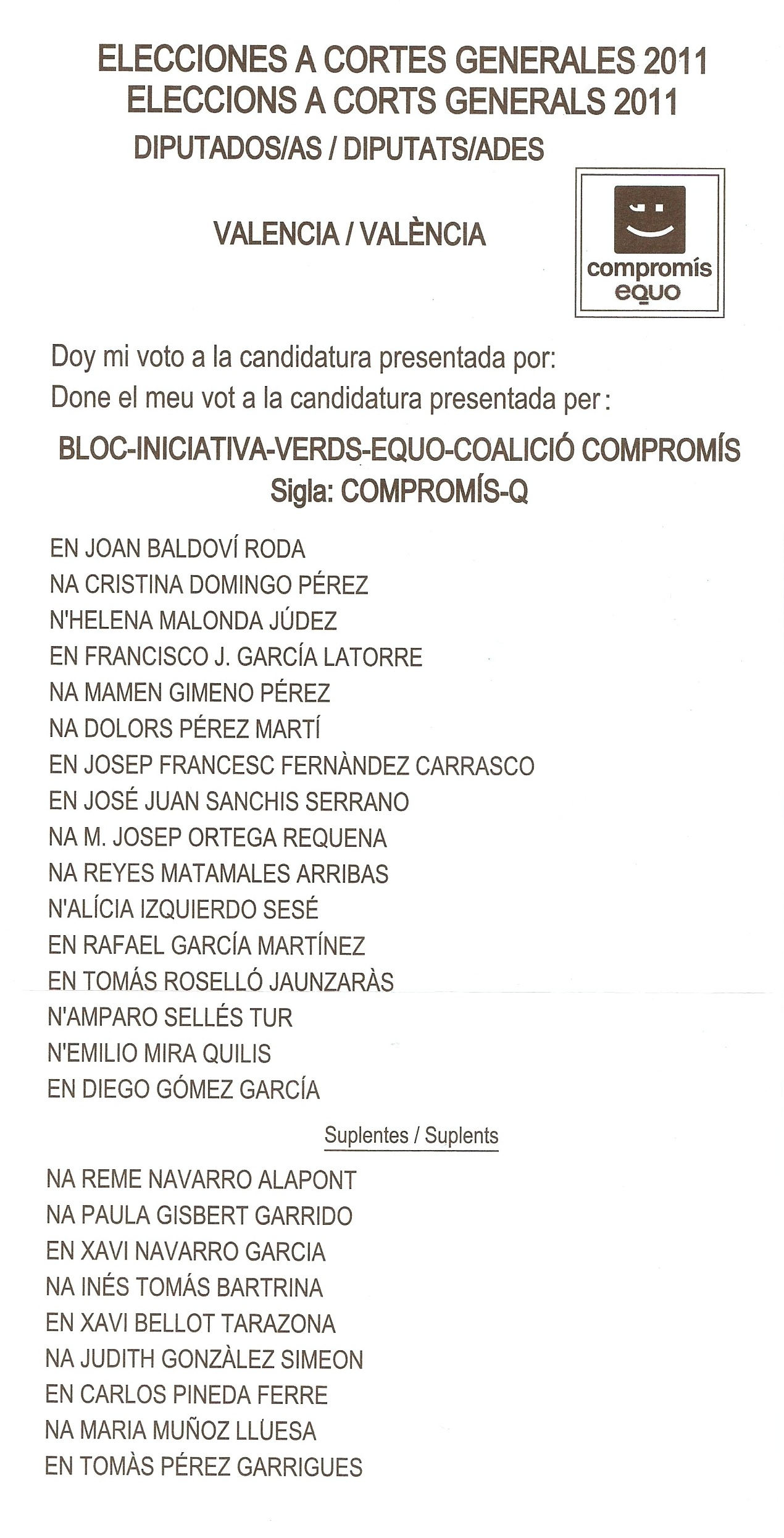 Papeleta de Bloc-Iniciativa-Verds-Equo-Coalició Compromís por Valencia al Congreso, elecciones de 2011